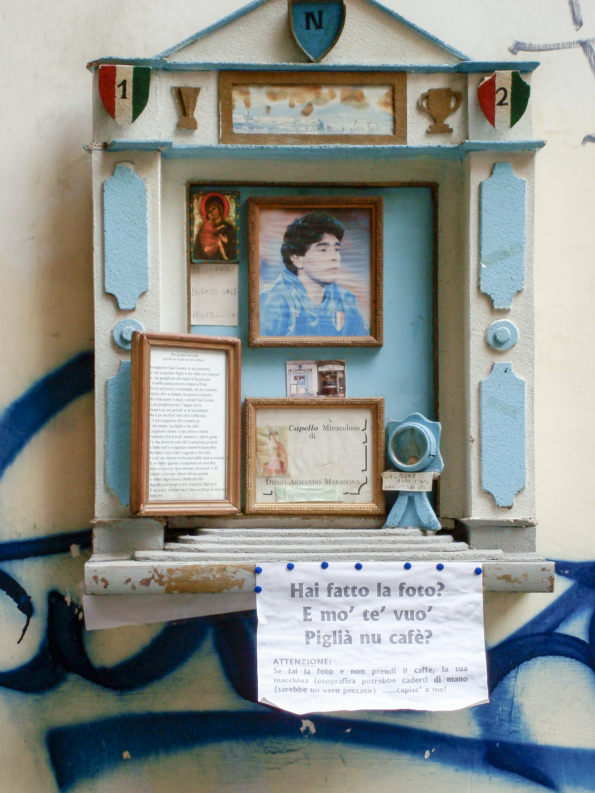 Napoli, via Spaccanapoli, Largo Corpo di Napoli. L'ultima edicola votiva realizzata a Napoli: il quadretto centrale contiene la reliquia di un piccolo ciuffo di capelli di Maradona ("Capello miracoloso di Diego Armando Maradona"), sicuramente un divertimento per i napoletani e tutti i turisti stranieri che qui vengono per ammirare la statua del Nilo. Ma forse nell'animo napoletano oltre al divertimento c'è anche una ammirazione e devozione sentita ma non confessata per questa reliquia: un "autentico" capello di Maradona!